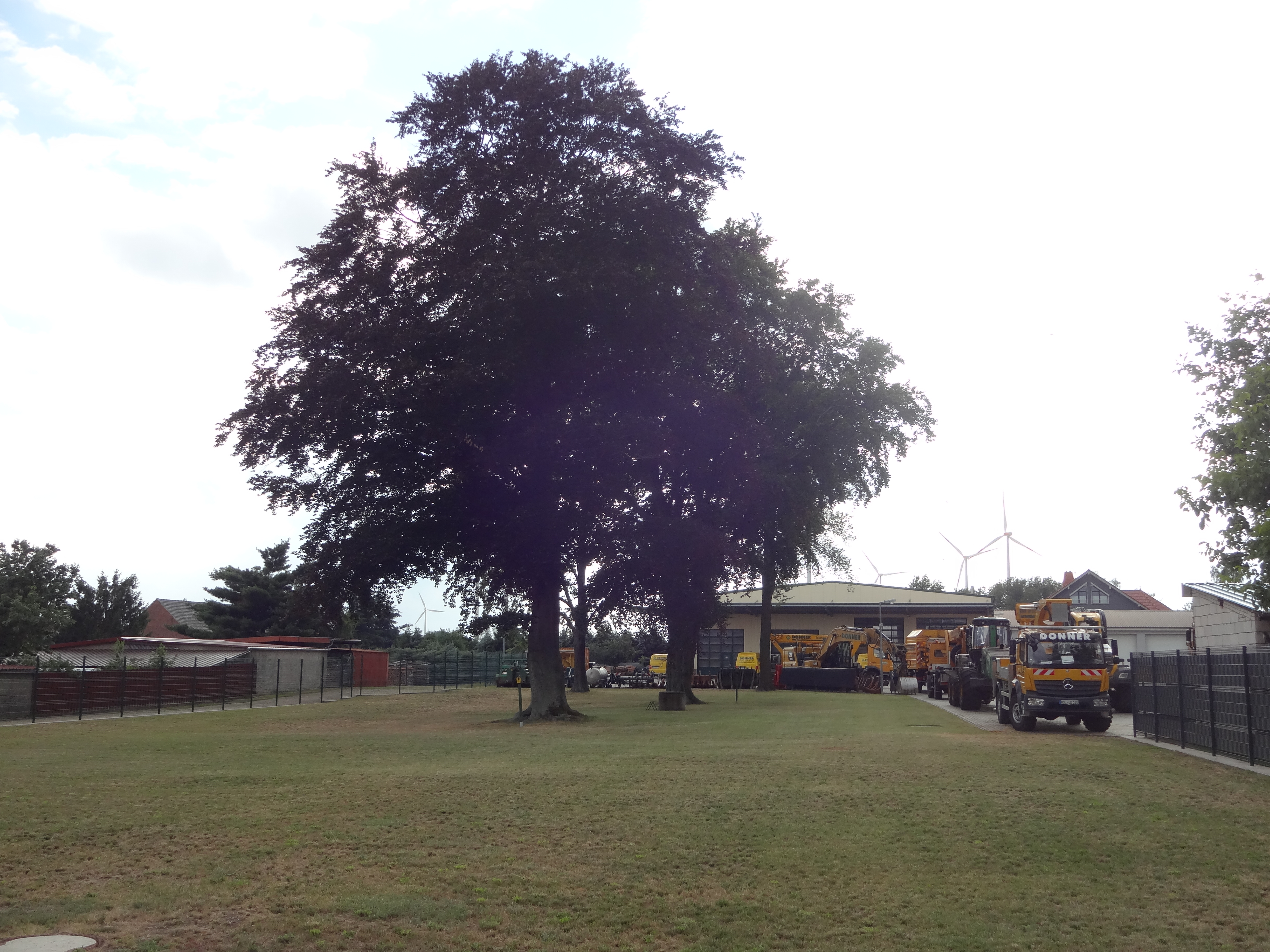 Naturdenkmale Rotbuche und Blutbuche in der Ortsstraße 21 in Saadow